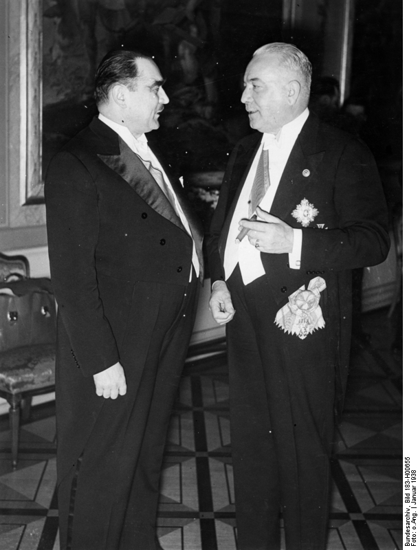 Empfang des Reichsaussenministers im Hause des Reichspräsidenten zu Ehren des jugosl. Ministerpräsidenten Stojadinowitsch und seiner Gattin. Reichsaussenminister Frhr. v. Neurath im Gespräch mit dem jugosl. Gast. Fot. Was 15.1.1938 Information added by Wikimedia users.